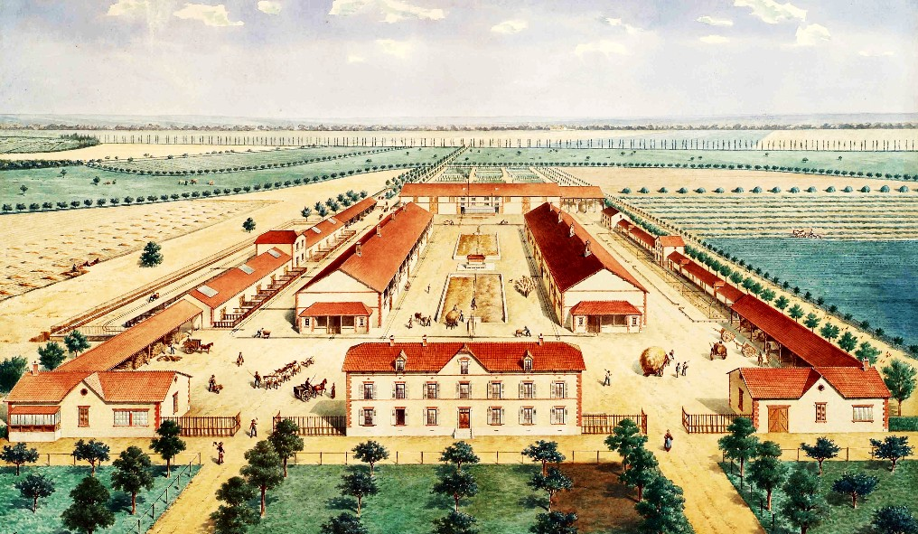 Ferme de Platé, Archives Moisant-Savey 1880